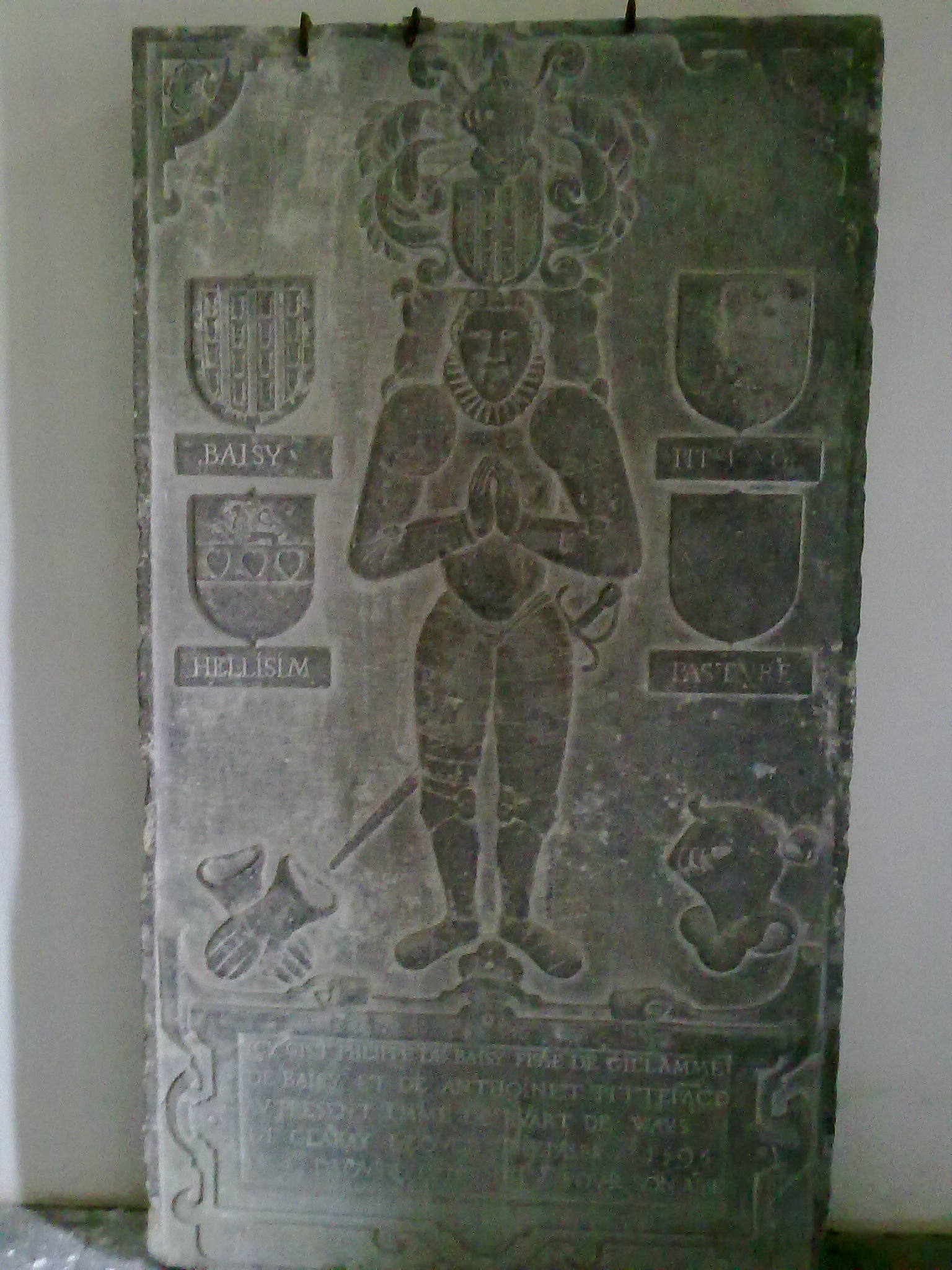 Pierre tombale entrée église de Ways (Bousval)